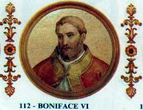 Pope Boniface VI